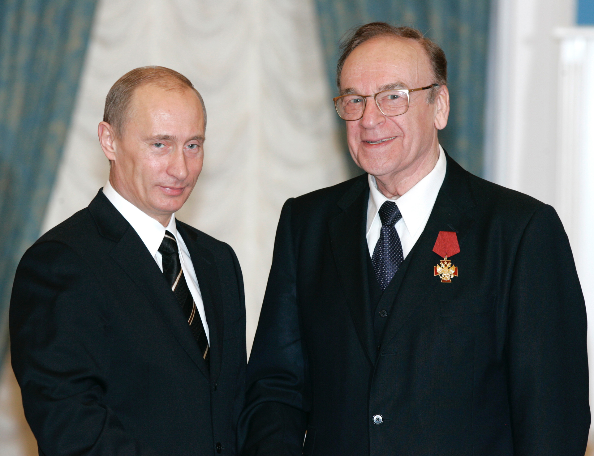 Игорь Кириллов в Кремле, во время вручения ордена «За Заслуги перед Отечеством» IV степени. 21 декабря 2006 года